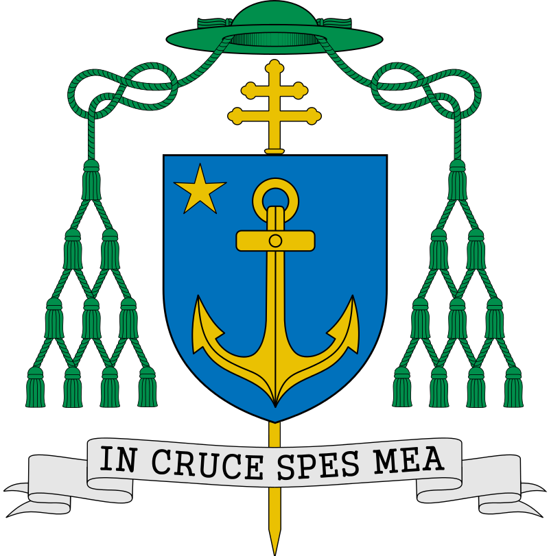 Armes de Mgr Roland-Gosselin, archevêque de Laodicée This SVG coat of arms includes elements that have been taken or adapted from this coat of arms: Coat of arms of Mgr Benjamin Roland-Gosselin.svg (by SanglierT). This SVG coat of arms includes elements that have been taken or adapted from this coat of arms: Template-Archbishop.svg (by SajoR).